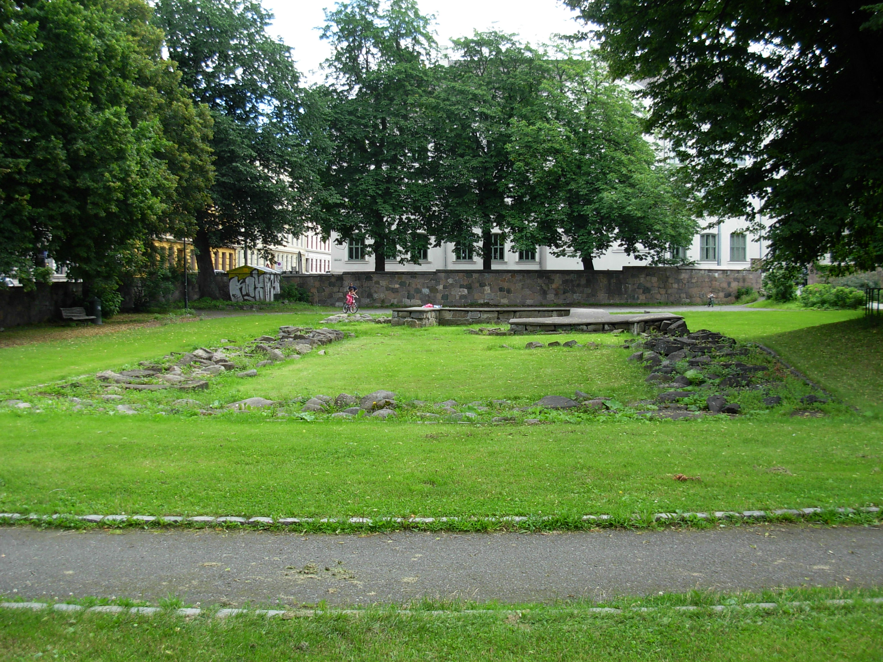 Ruinparken, Oslo, med ruiner av Korskirken